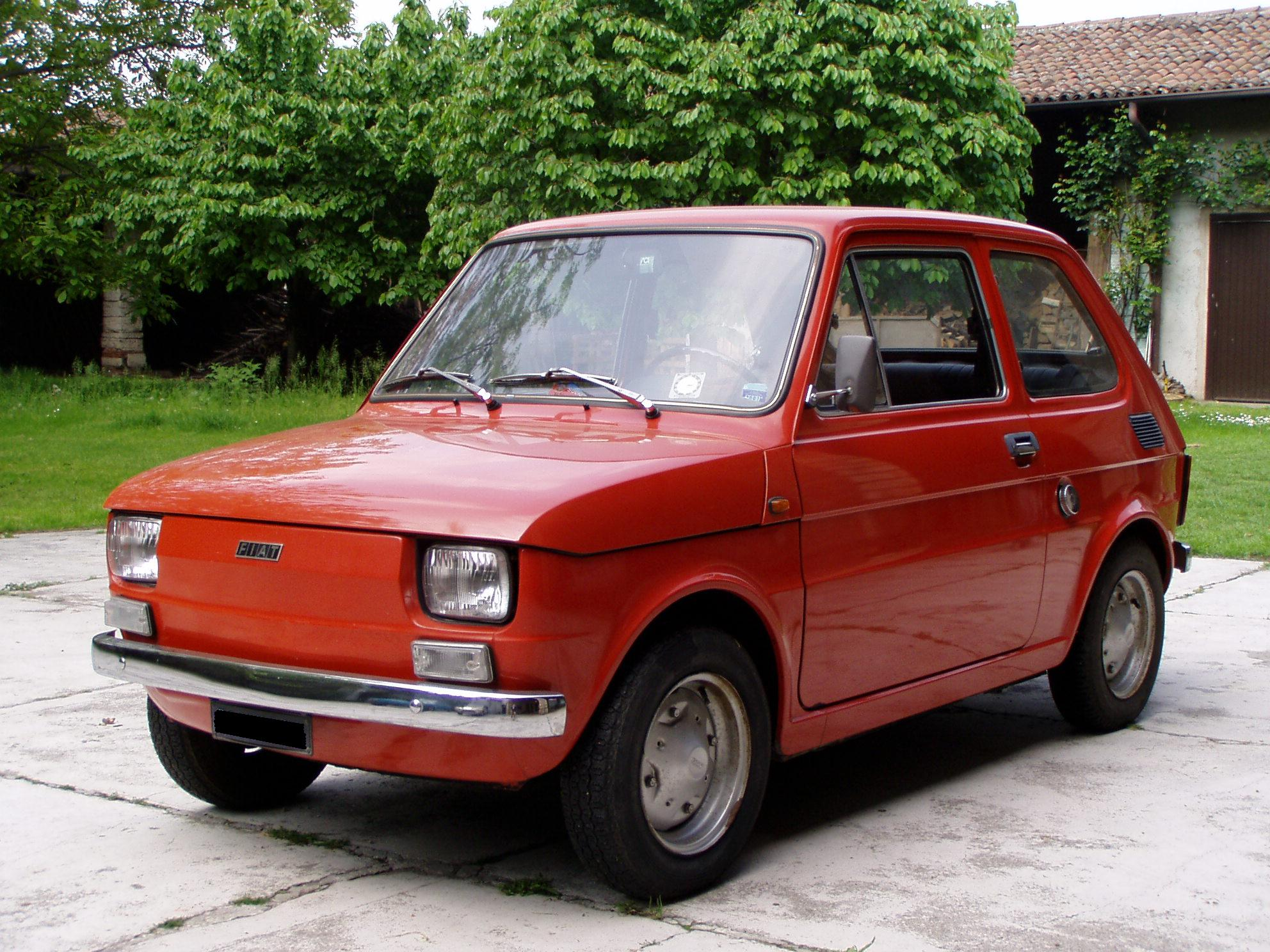 Camilla Giribardi , fiat 126 prima serie del 1973 , foto scattata da me